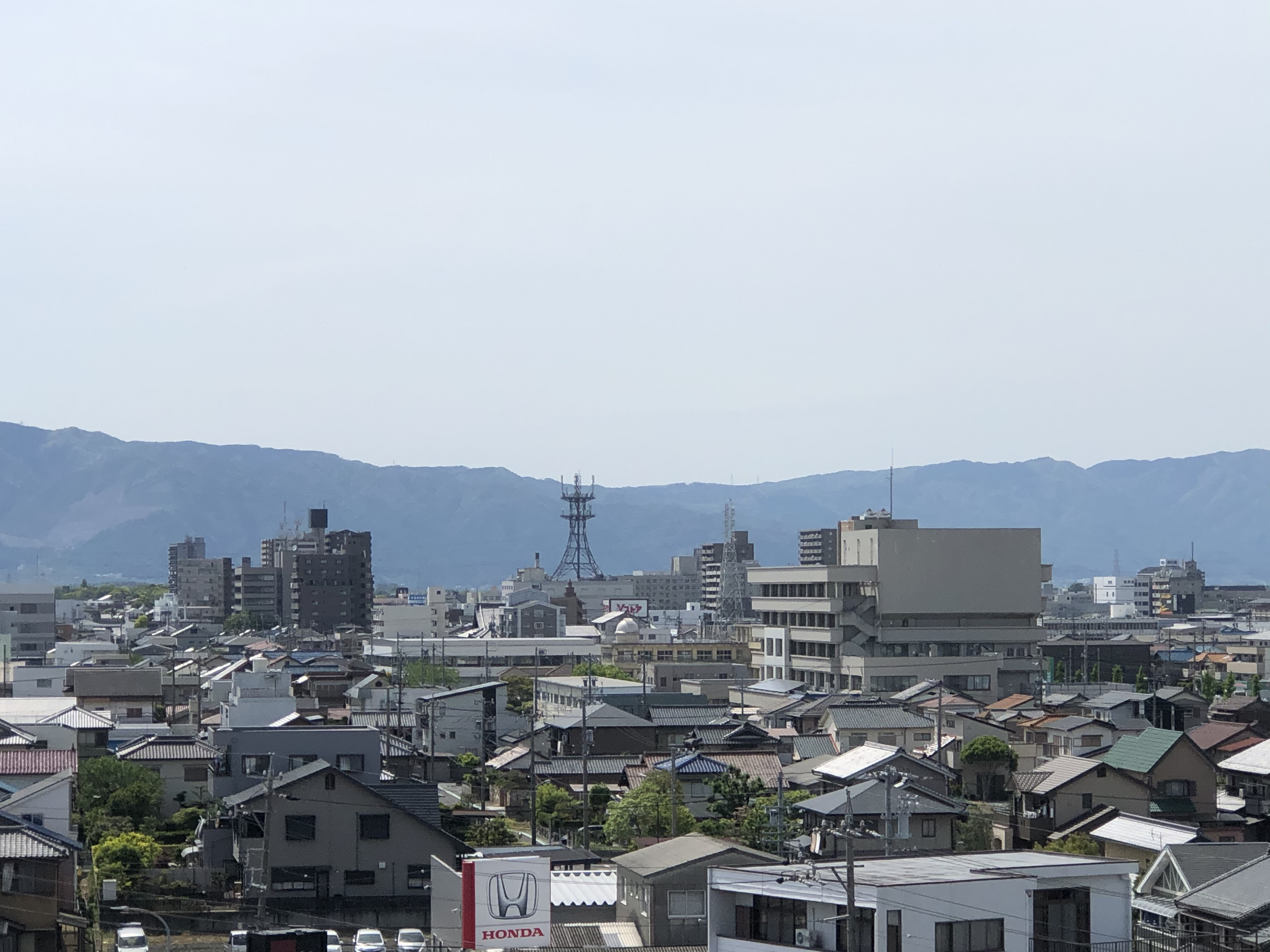 ヨシヅヤ津島本店から見た津島市街